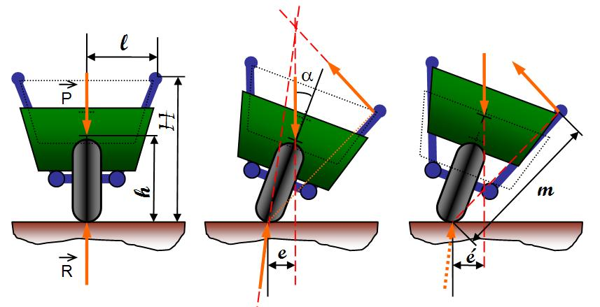 Comportement de la brouette : paramètres liés à l’aptitude au basculement (schéma réalisé sous Word). À gauche : brouette en situation normale, assiette droite. Mise en place des paramètres. Au centre : brouette penchée. Situation des actions mécaniques pour le maintien de l’équilibre statique. À droite : même situation avec une caisse plus haute. Le moment du poids est augmenté ce qui impose un effort supplémentaire pour le maintien. Catégorie:Statique Catégorie:Outil de jardinage